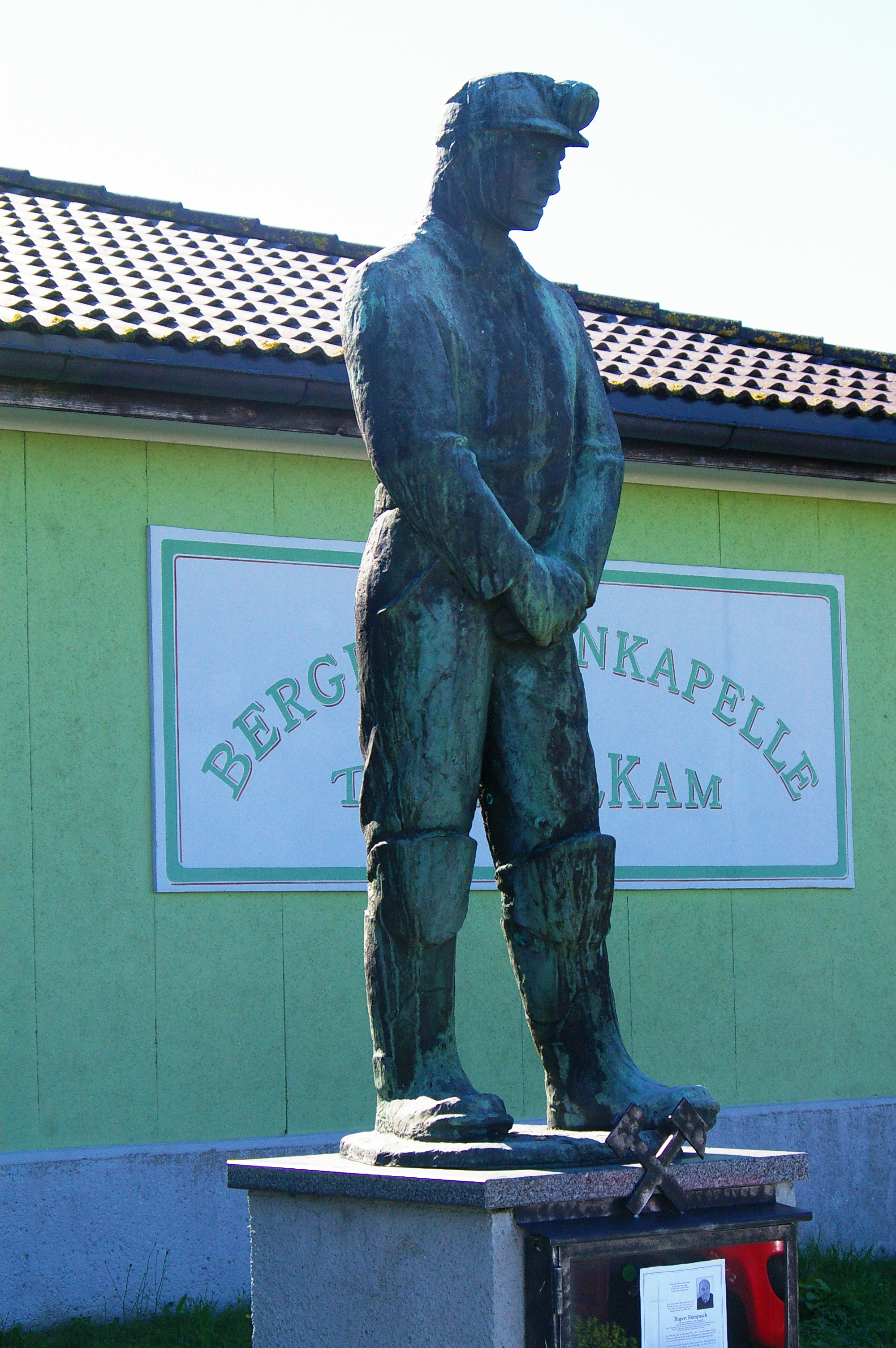 Erinnerung an den alten Kohlebergbau. Bergmann-Denkmal Trimmelkam, Gemeinde St. Pantaleon